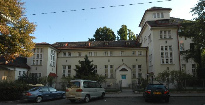 ehemaliges Karolinen-Kinderspital in Wien-Alsergrund, Ansicht von der Ayrenhoffgasse